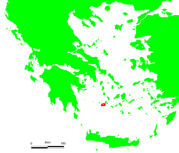 GR Milos.PNG (Greek island)